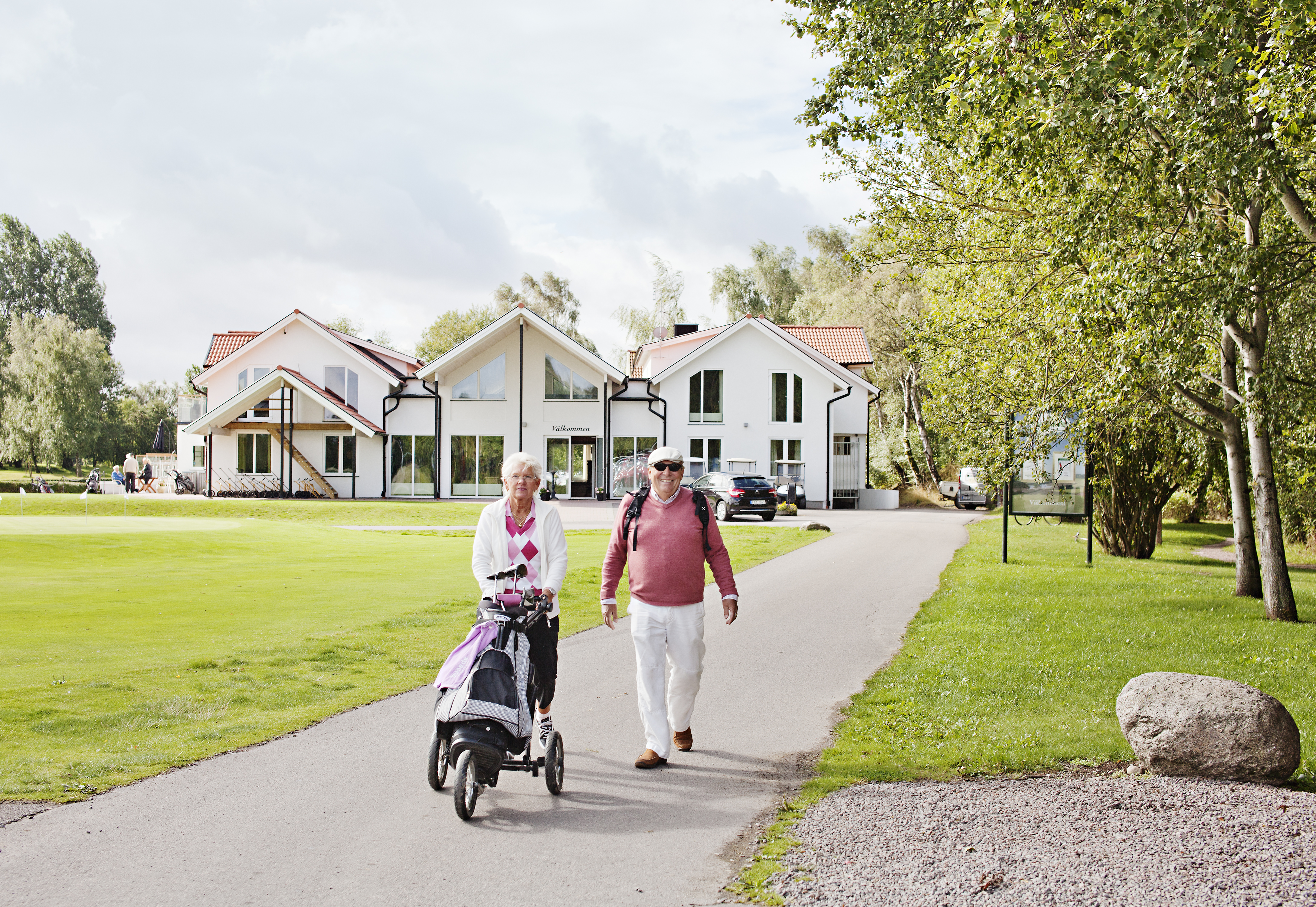 Golfare i Hyllinge.